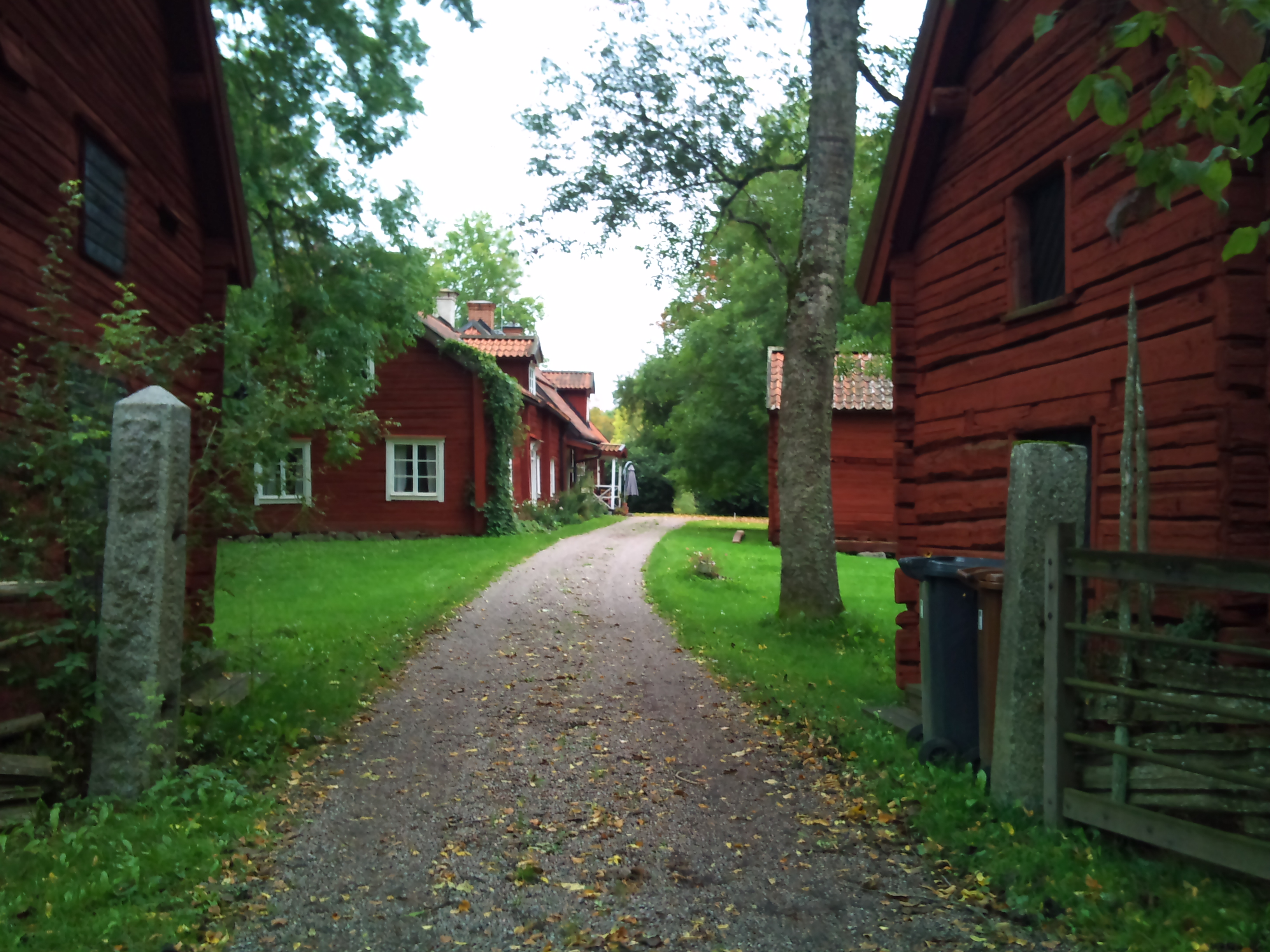 Skuttunge gamla prästgård